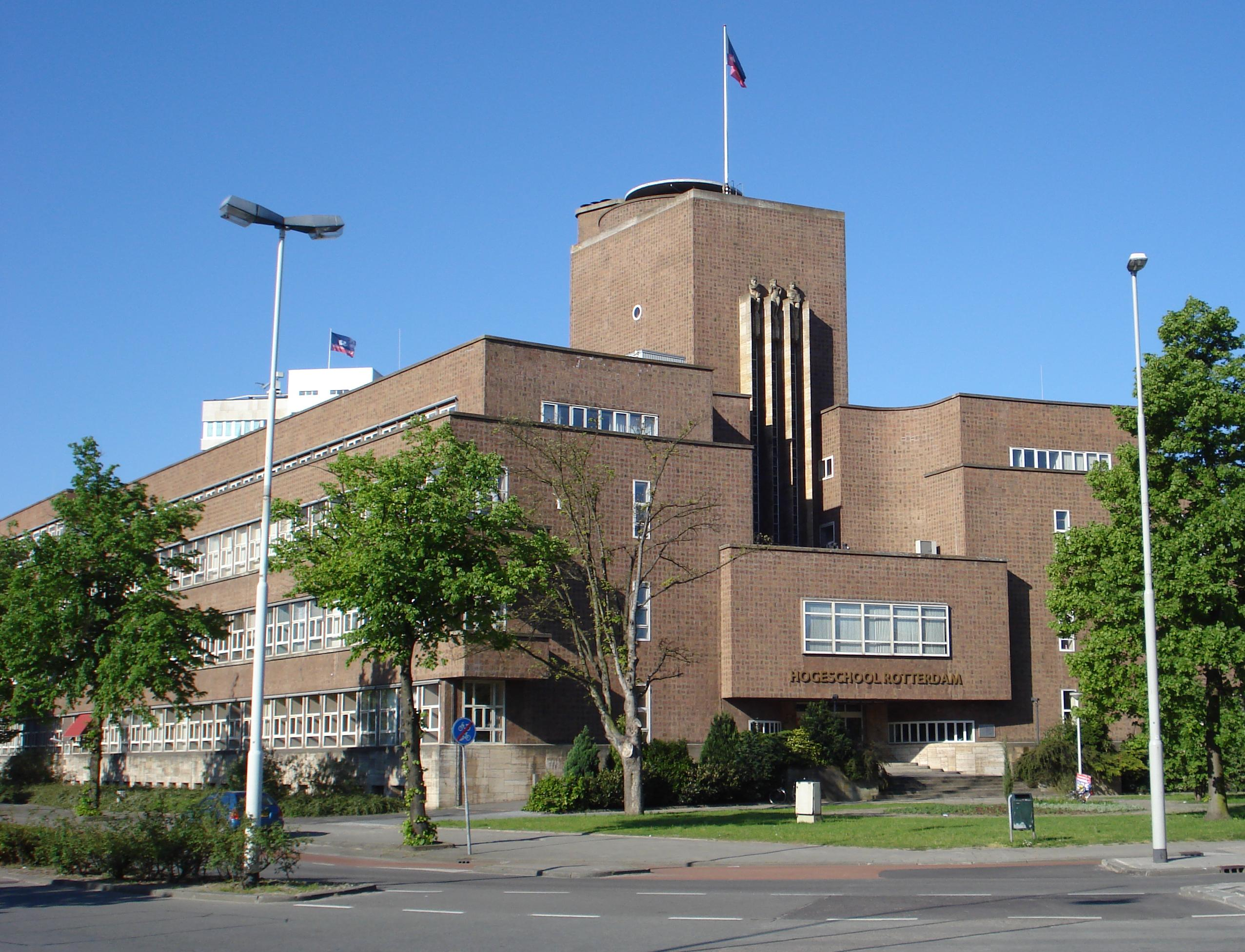 Rotterdam, Museumpark 40. Rijksmonument, voormalig hoofdkantoor Unilever, nu hoofdgebouw Hogeschool Rotterdam.